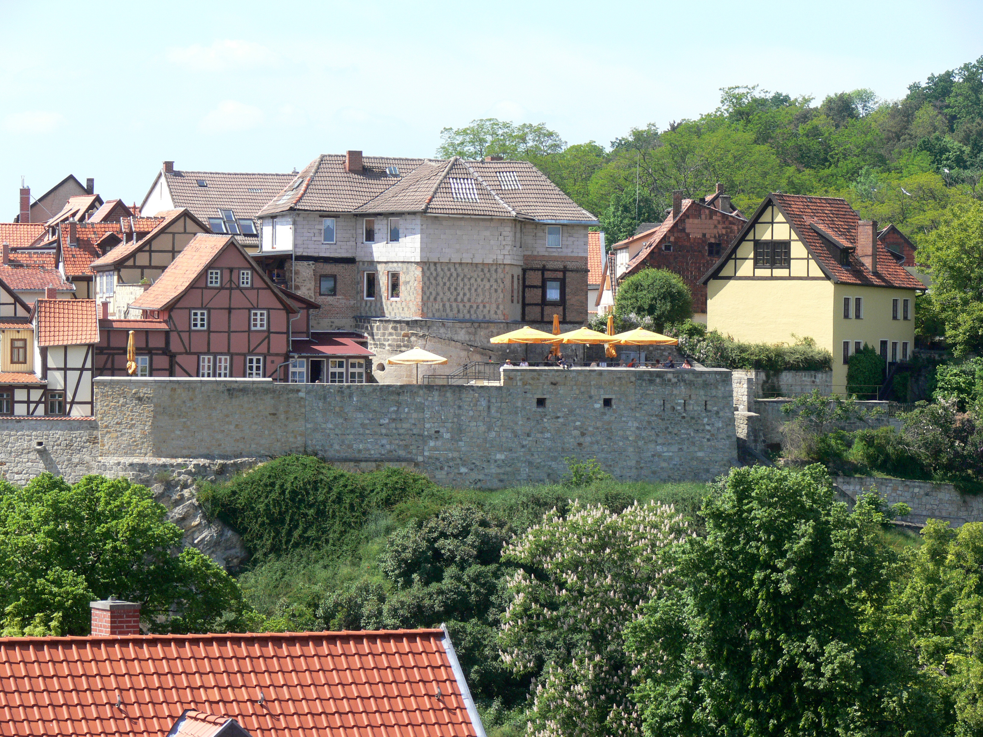 Blick vom Schloss in Quedlinburg auf den Münzenberg.